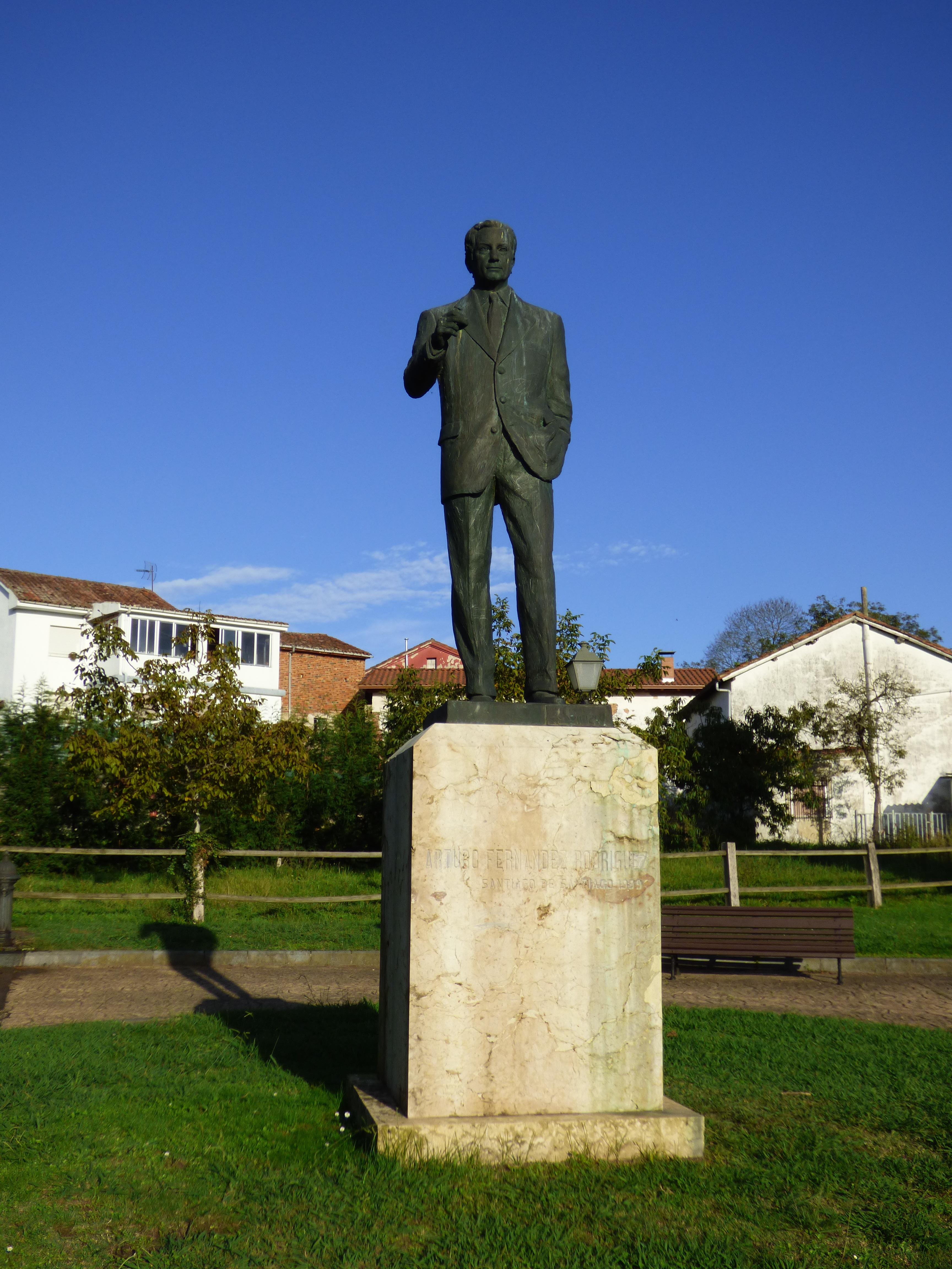 Monumento al actor Arturo Fernández Rodríguez en el parque infantil de su nombre que hay en el pueblo de Priañes, municipio de Oviedo, Asturias, España. Escultura de Santiago de Santiago. Año 1999.